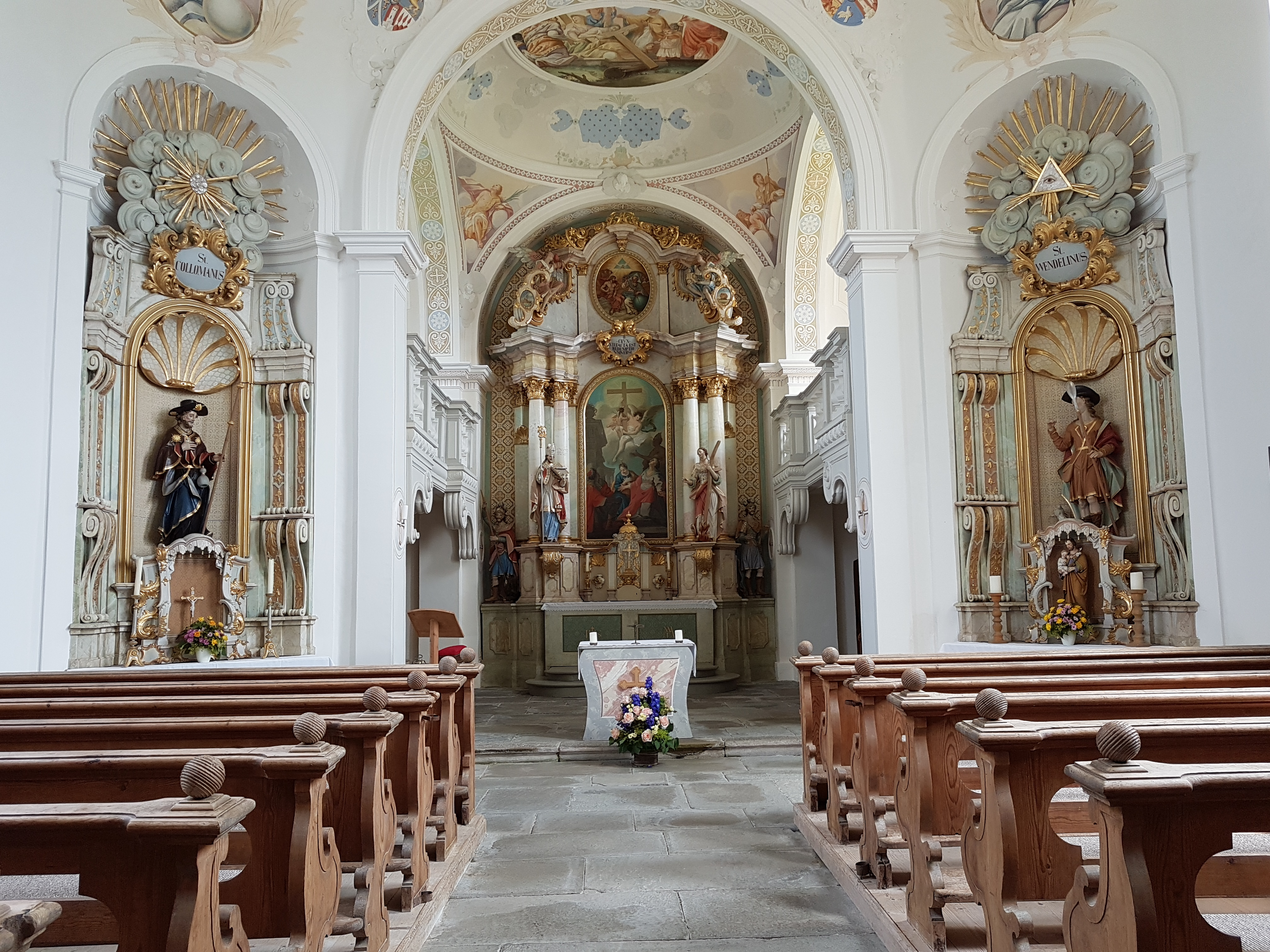 Kreuzberg